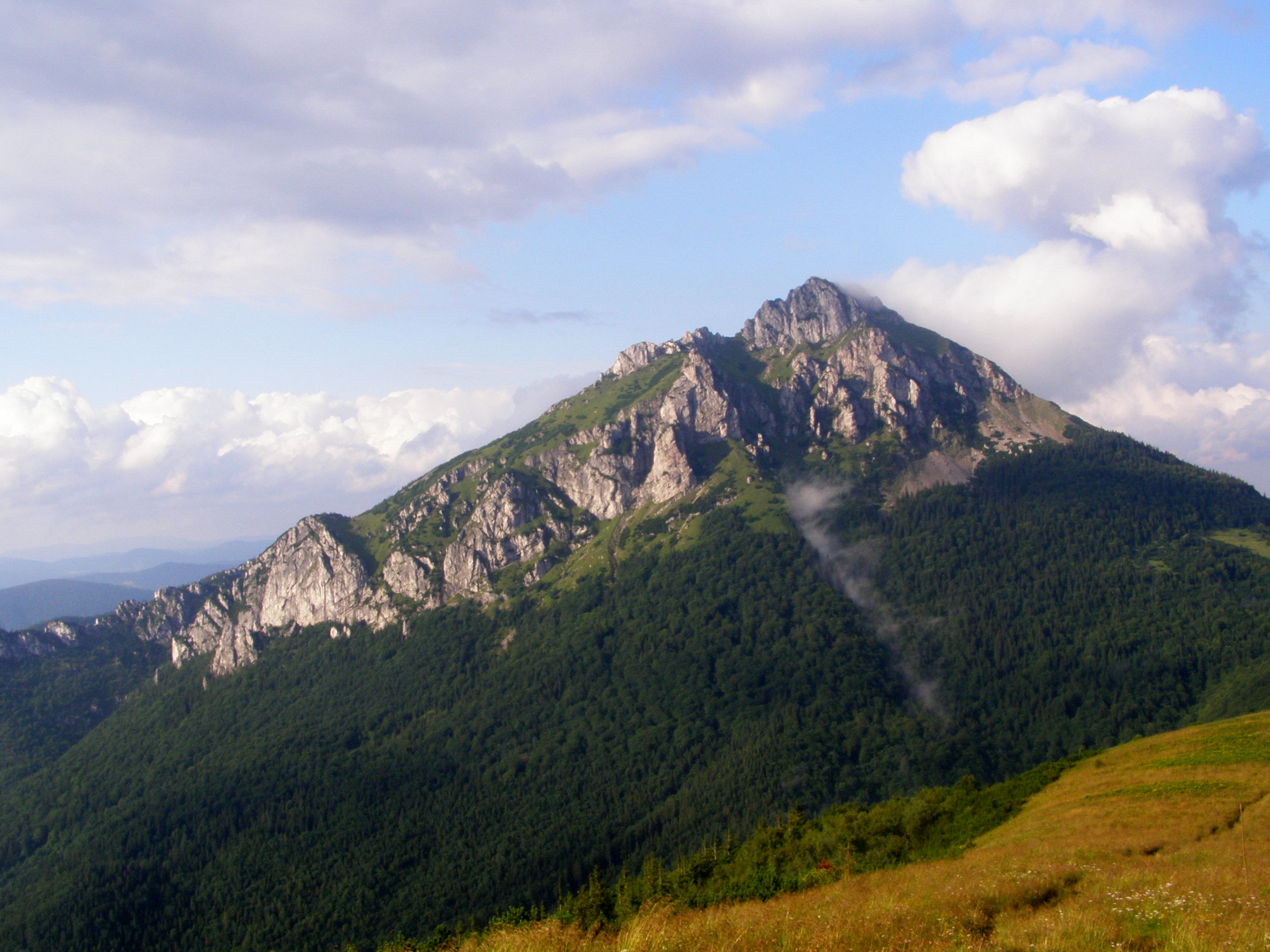 Krivánská Malá Fatra, Velký Rozsutec (1610 m), pohled ze Stohového sedla